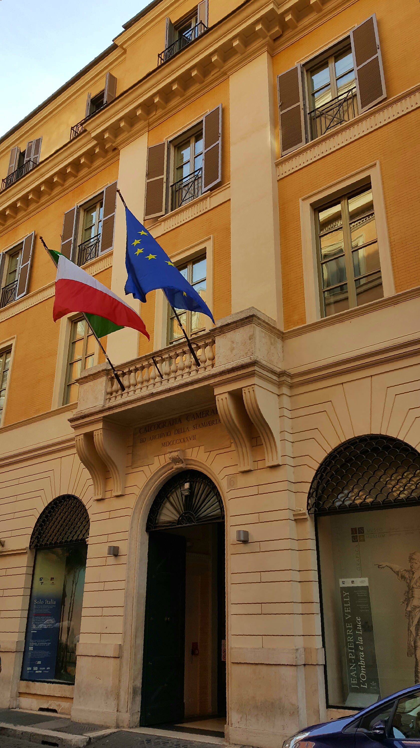 Sede del museo Istituto nazionale per la grafica, a Roma, via della Stamperia.